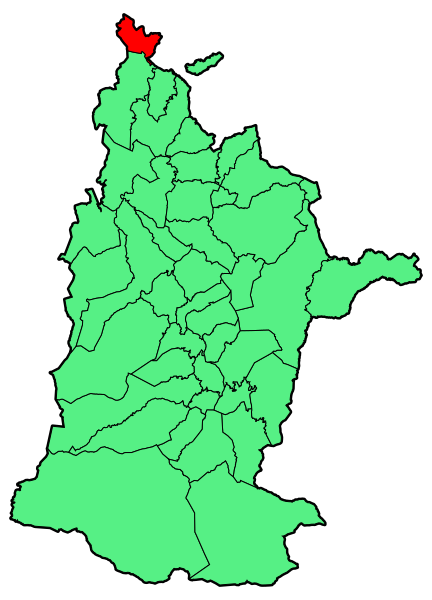 Aipaturiko udalerriaren kokapena Zuberoan